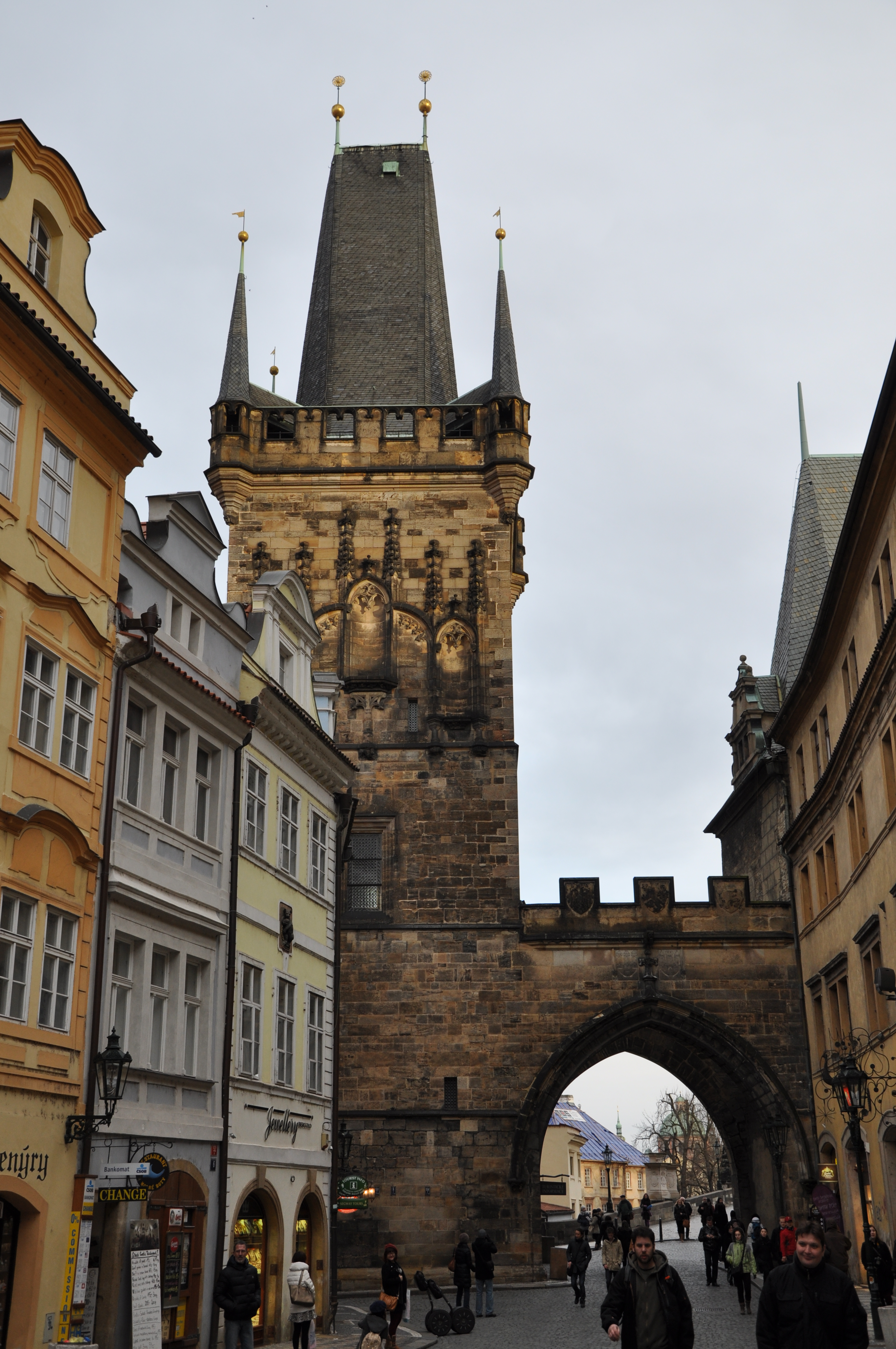 Malostranská mostecká věž, pohled z Mostecké ulice, Praha